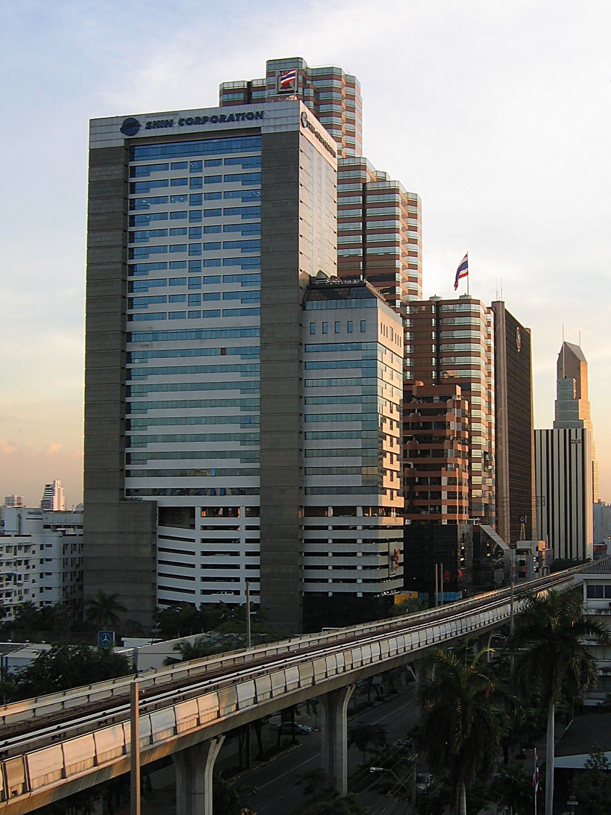 Buildings on Phahonyothin Road, Phaya Thai District, Bangkok.